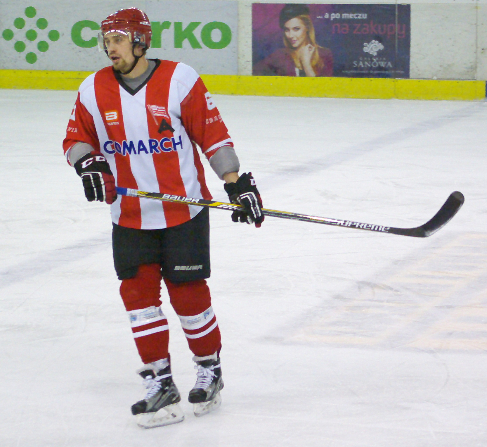 Krystian Dziubiński w barwach Cracovii w meczu przeciw STS Sanok (Arena Sanok, 17 stycznia 2016)